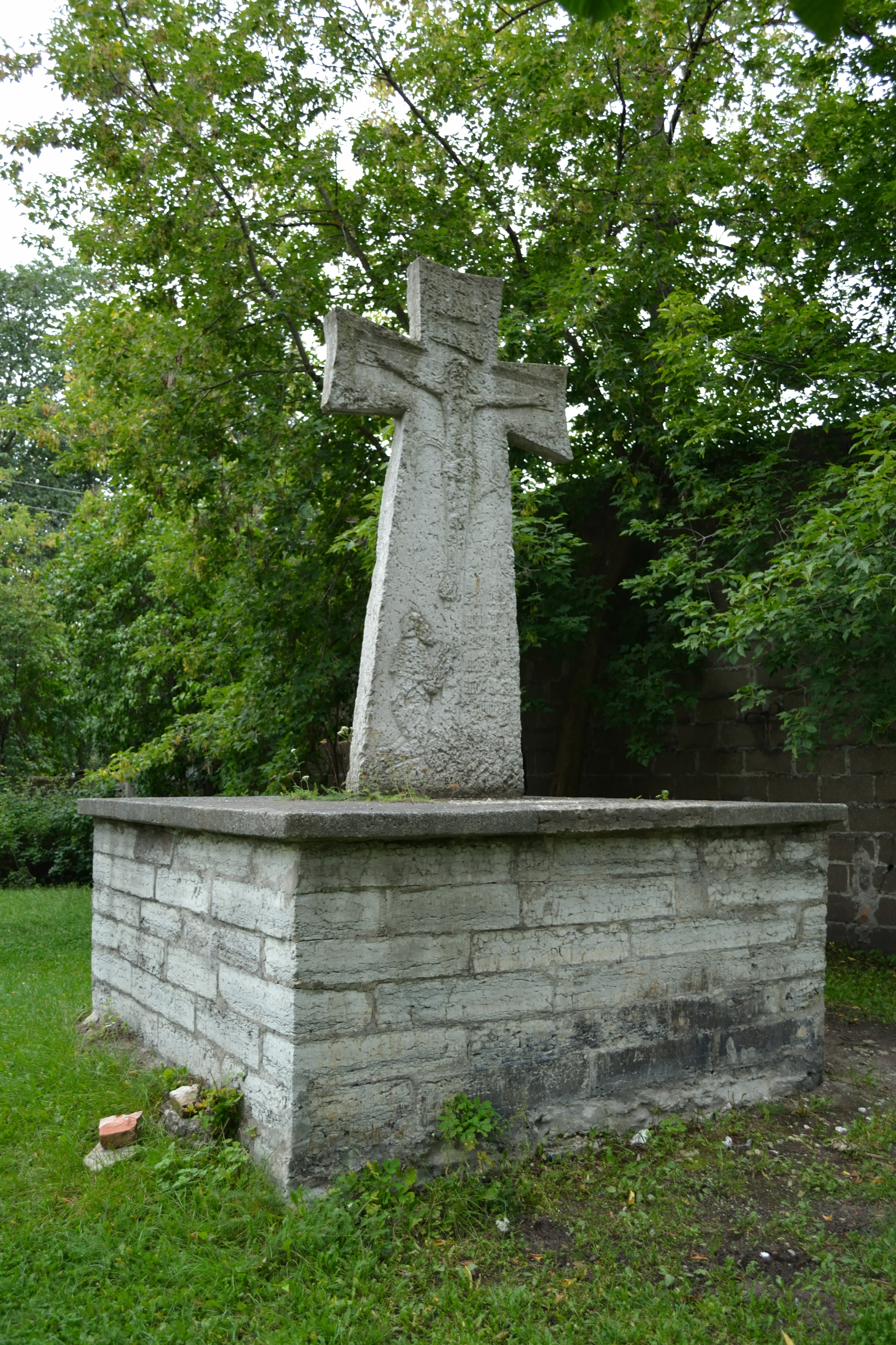 Blasius Hochgrewe monument, 1560